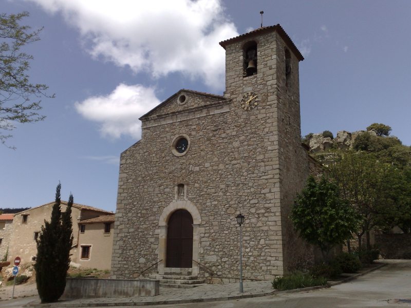 Esqlésia parroquial de Sant Miquel